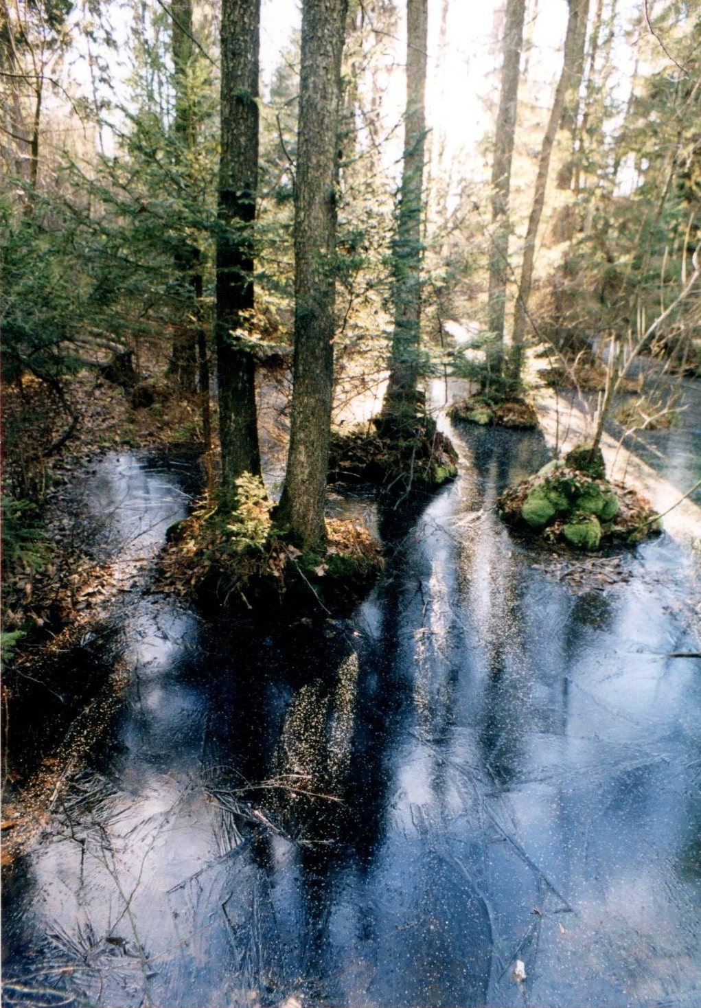 Autor: Adrian Grzegorz Rok wykonania: 2003